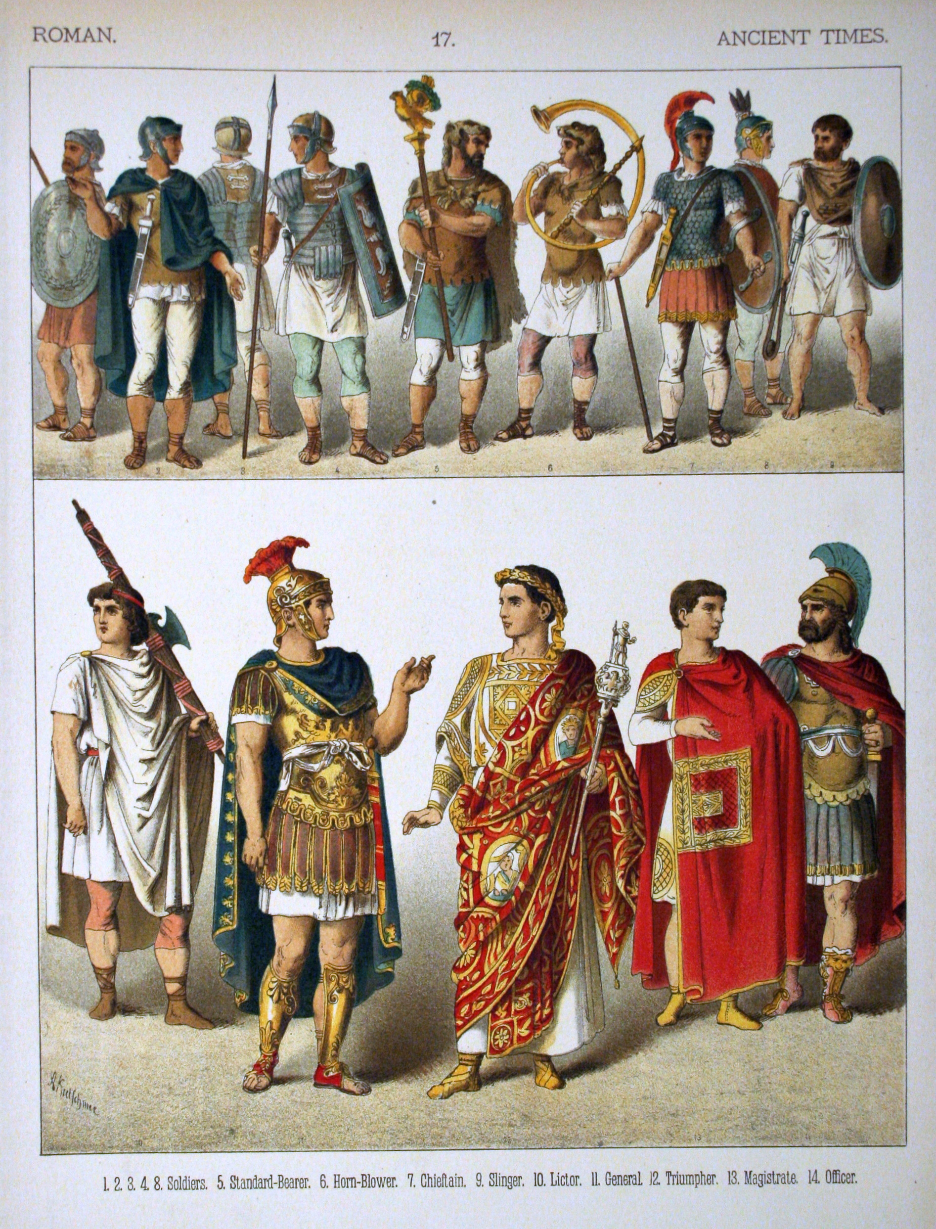 Ancient Times, Roman